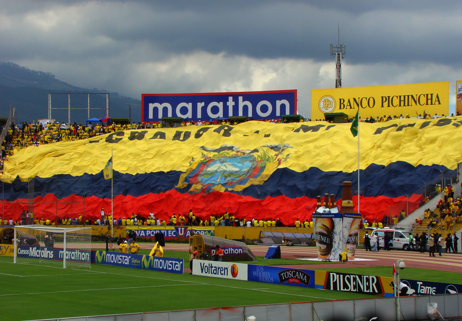 La Tradicional Tri Gigante